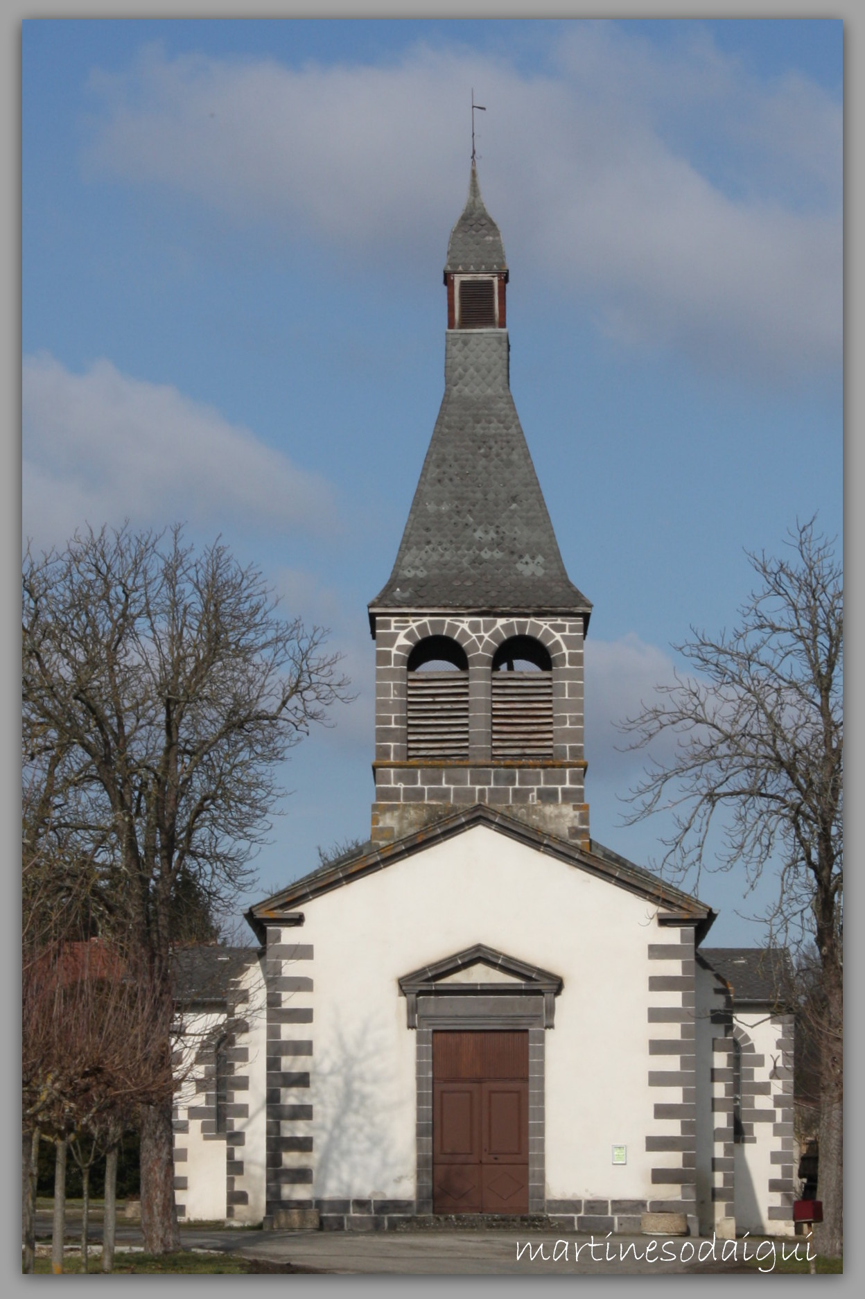 Villeneuve les Cerfs (63)